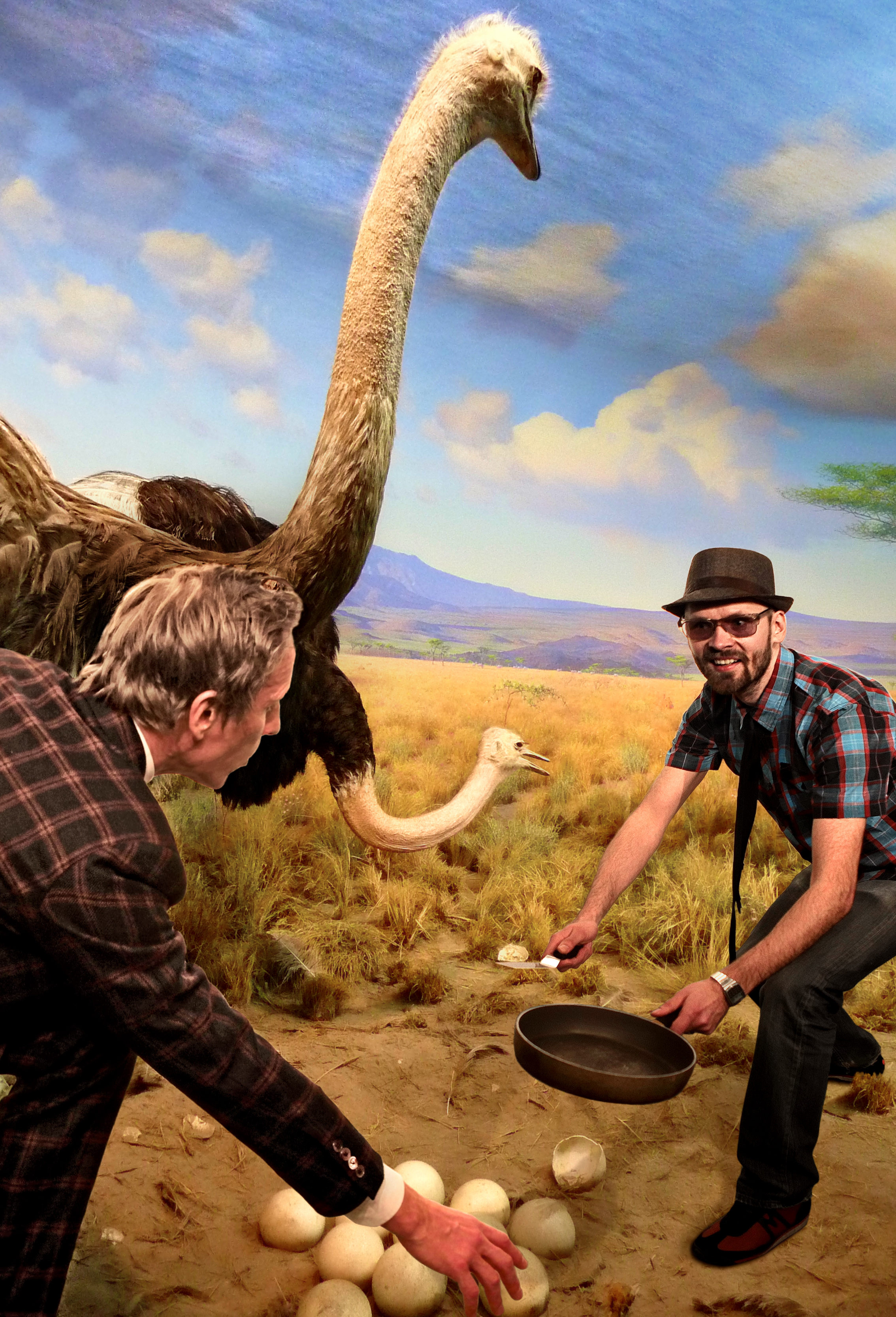 Pepe Deluxé's Paul Malmström and James Spectrum